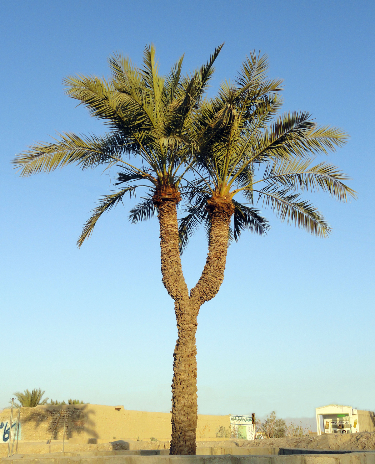 نخل دوقلوی چاهورز- شهرستان لامرد- استان فارس